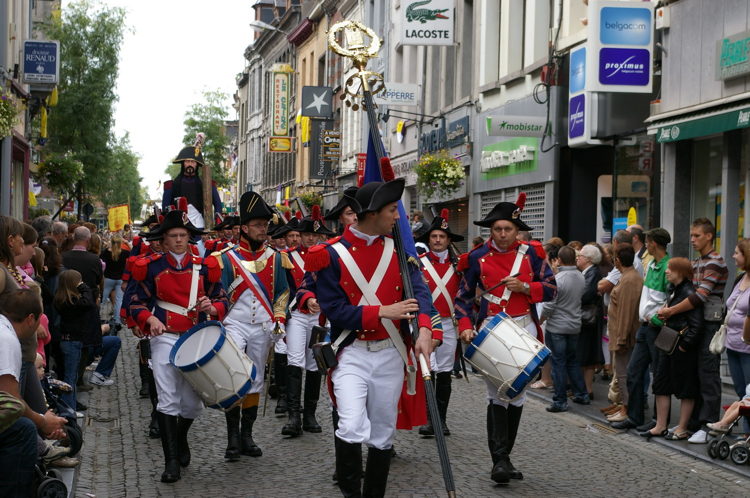 Les Bleus, ducasse d'Ath 2008